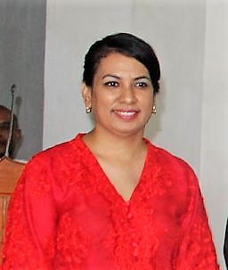 Benicia Eriana Ximenes dos Reis Magno, Provedoria dos Direitos Humanos e Justiça